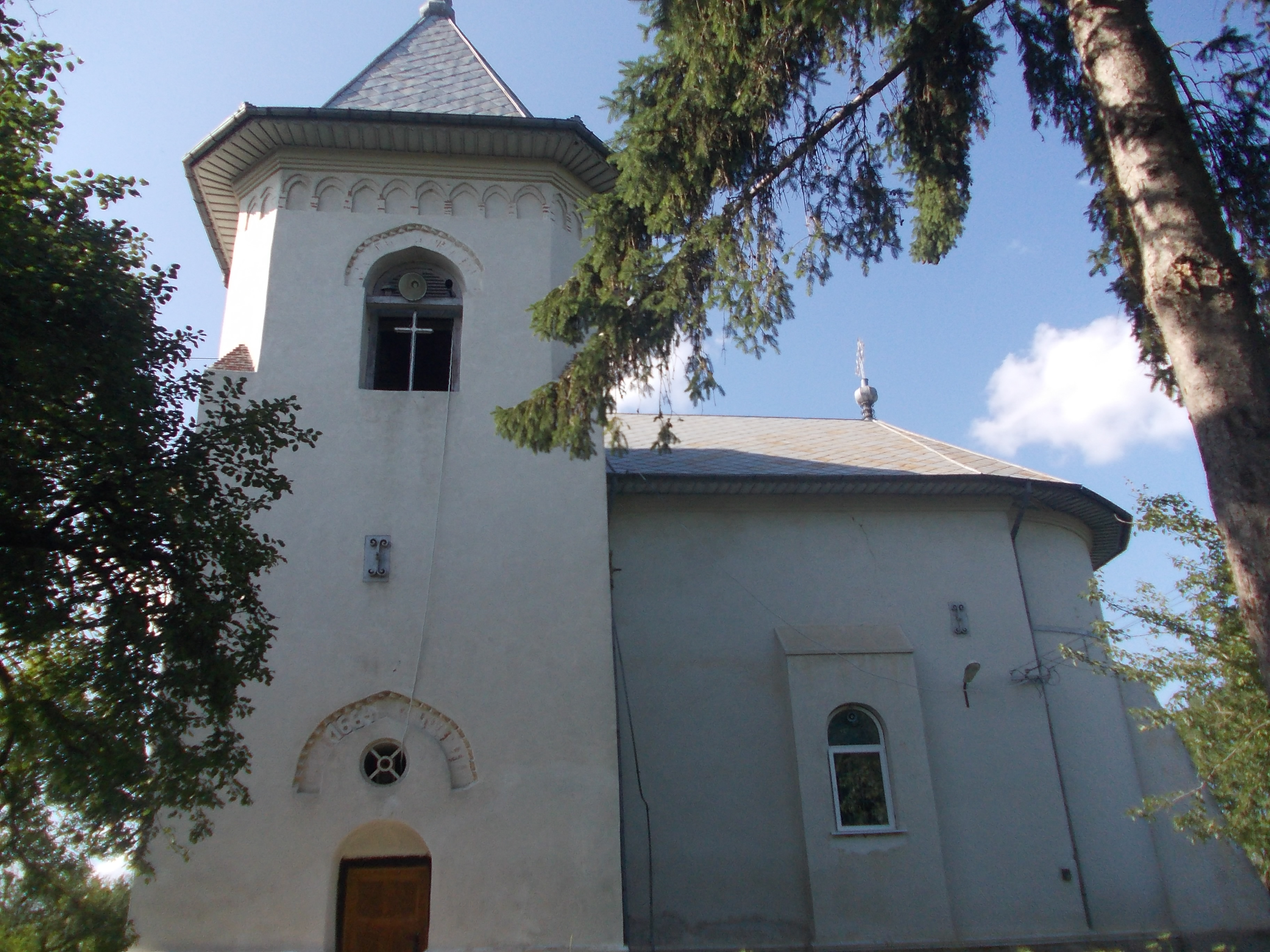 Kalaallisut: Biserica "Nașterea Sf. Ioan Botezătorul"